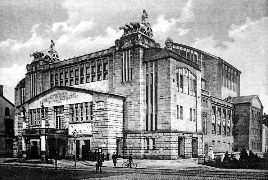 Historische Postkarte, Stadttheater